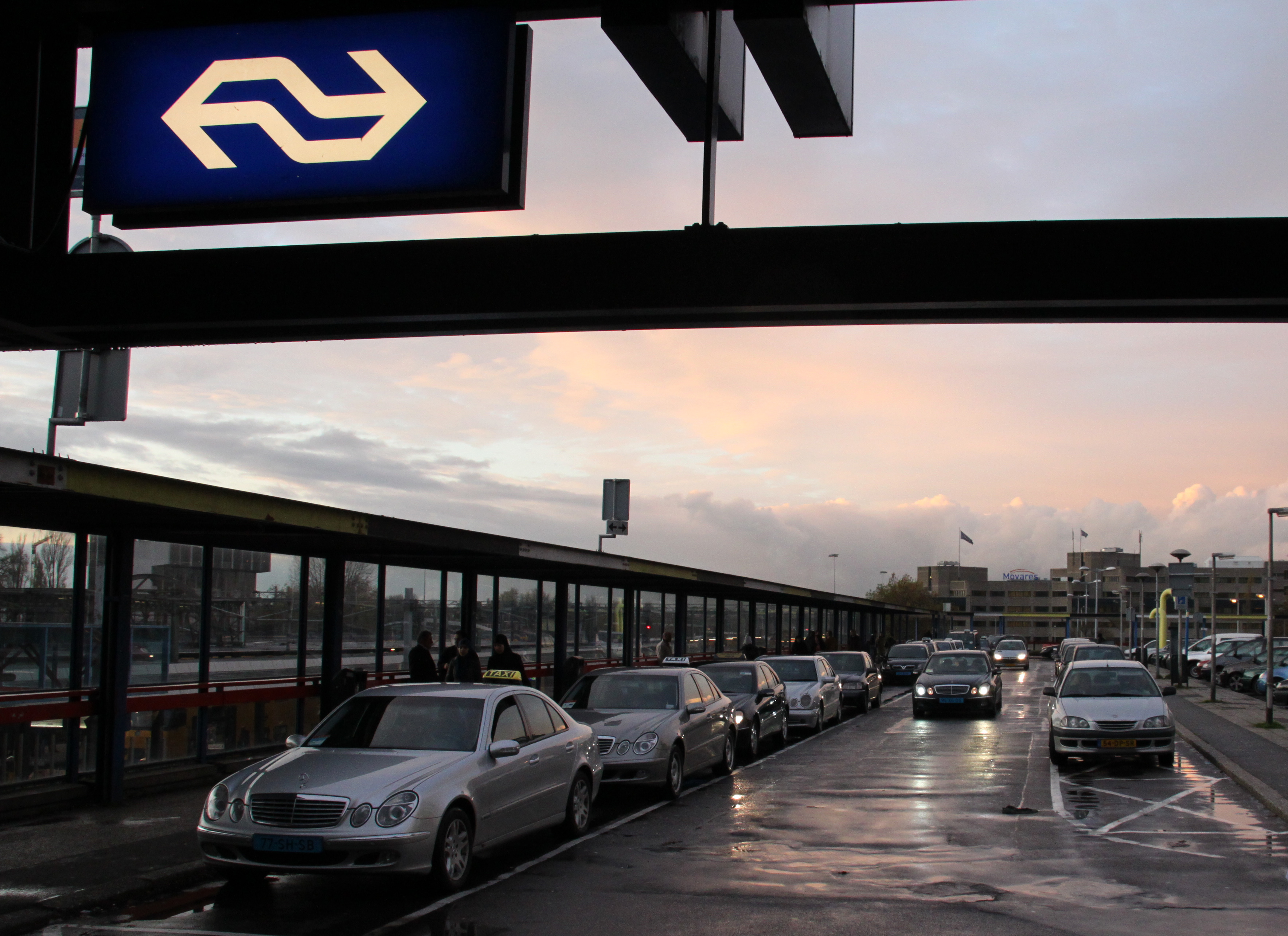 former taxiplatform Utrecht Centraal